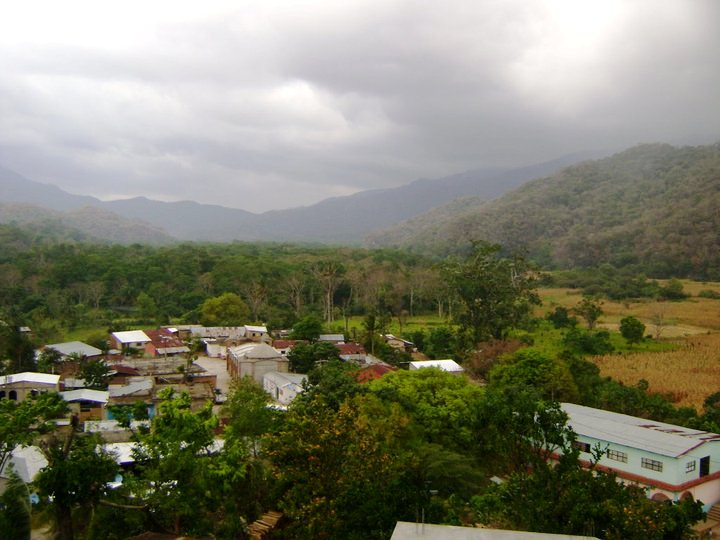 Panorama al Noroeste de la población de Guigovelaga, estado de Oaxaca, México.